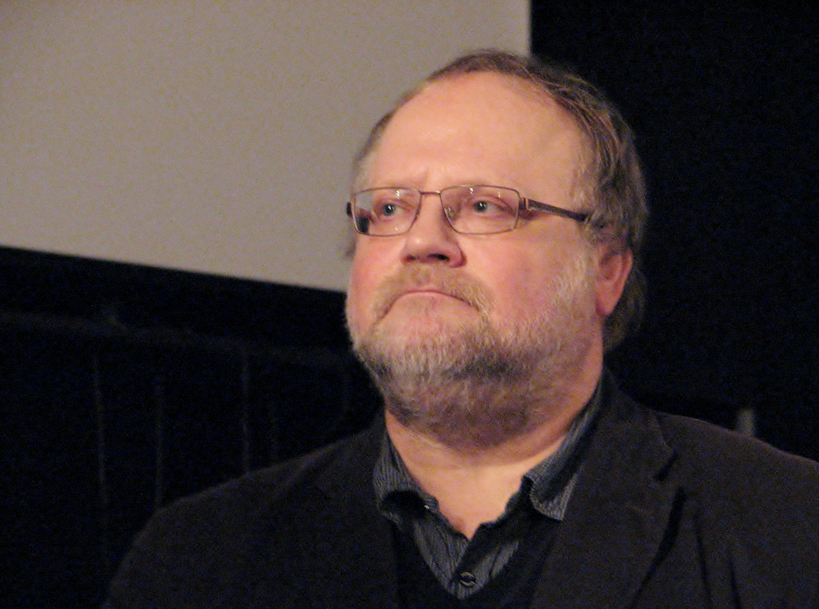 Jaak Lõhmus Tallinna Kinomajas Eesti filmi teisipäeval